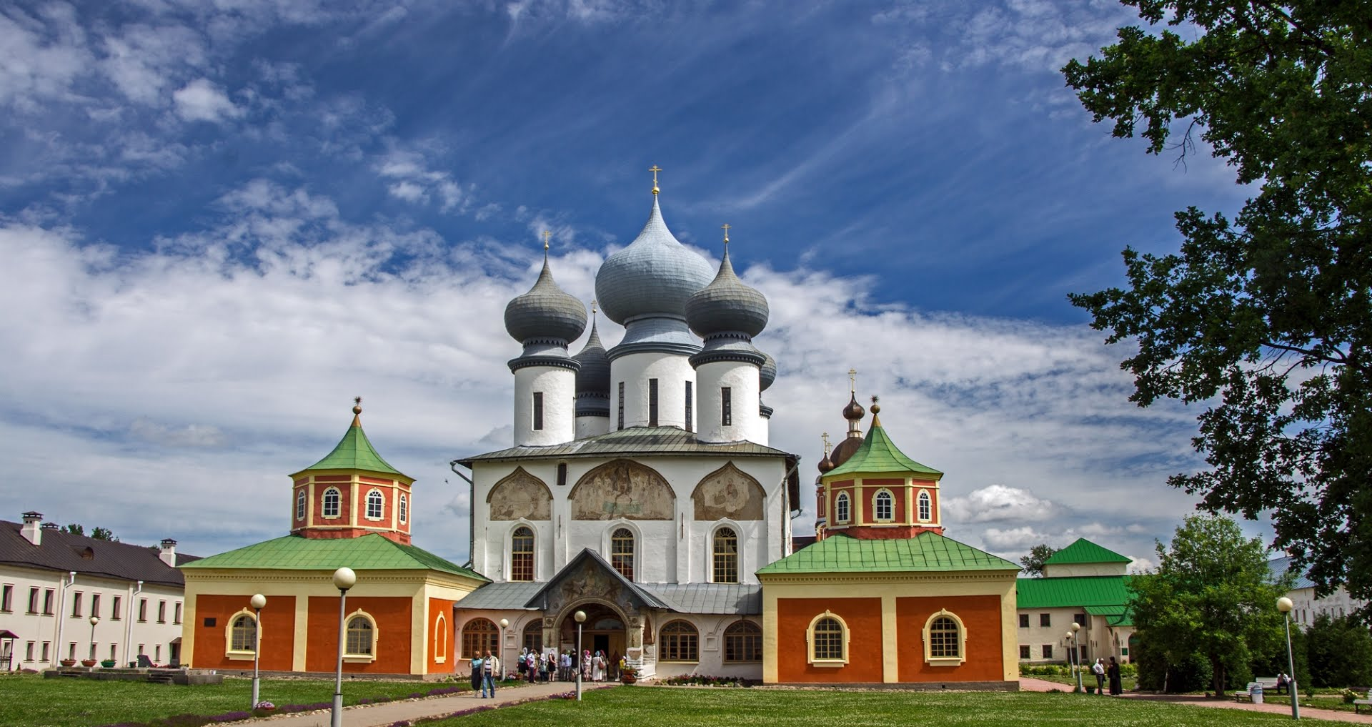 Собор Успенский: улица Тихвинская, 6-11, Тихвин, Тихвинский район, Ленинградская область